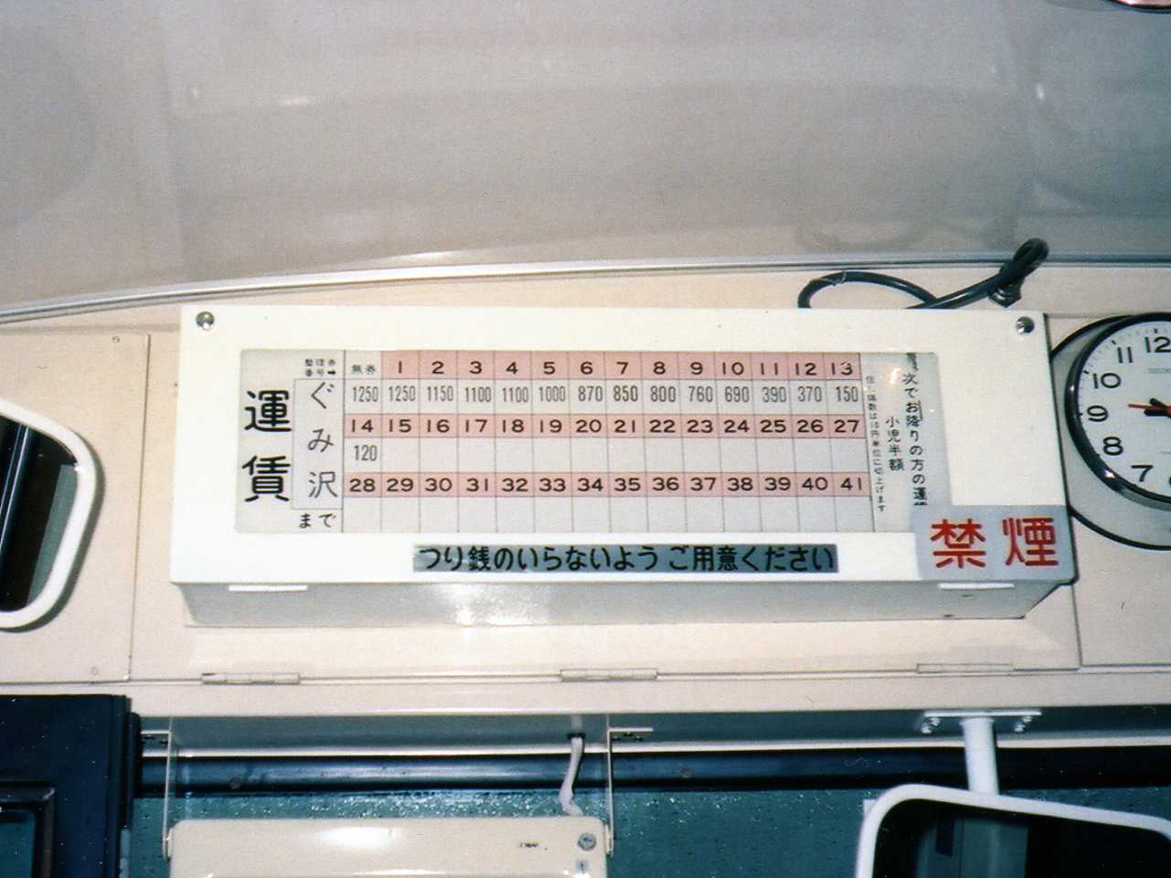 幕式運賃表示器の例 1988年頃に富士急行で使用されていたもの